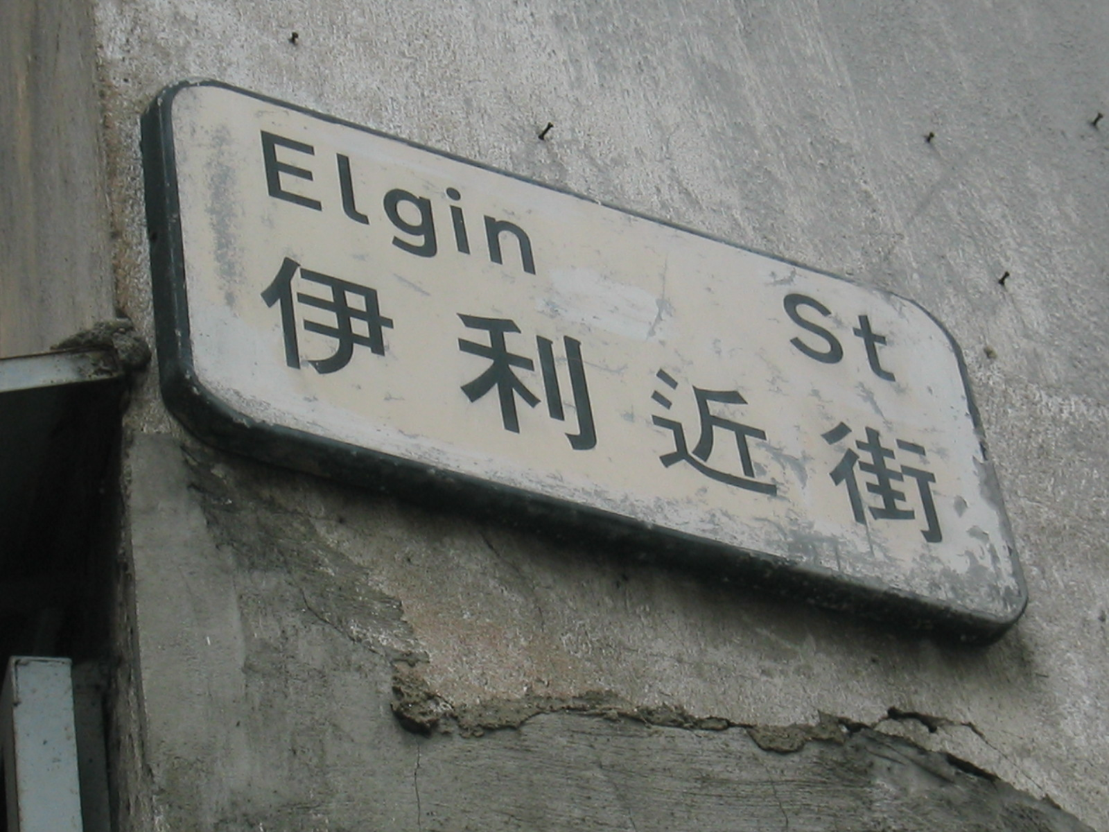 Elgin Street, Central, Hong Kong